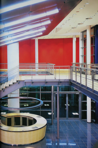 Konzerthaus Dortmund Innenansicht